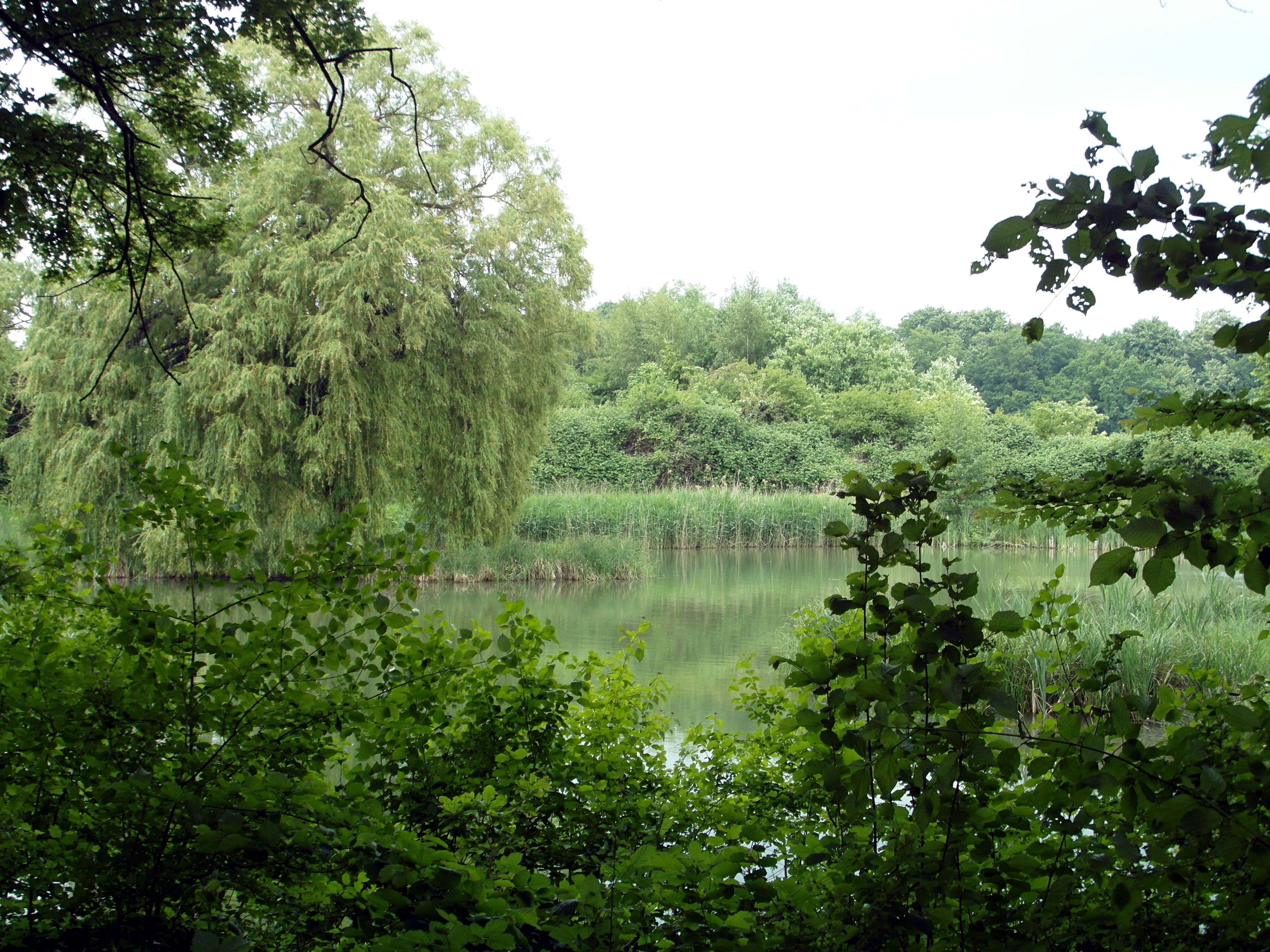 Blick durch eines des Sichtfenster in der Umzäunung des Biotops Badebornteich in LSG Benther Berg Vorland/Fössetal am Südwestrand des Stadtgebiets von Hannover. Dieser Teich ist eingezäunt als Biotop im Landschaftsschutzgebiet LSG H-S 00006 Benther Berg Vorland/Fössetal